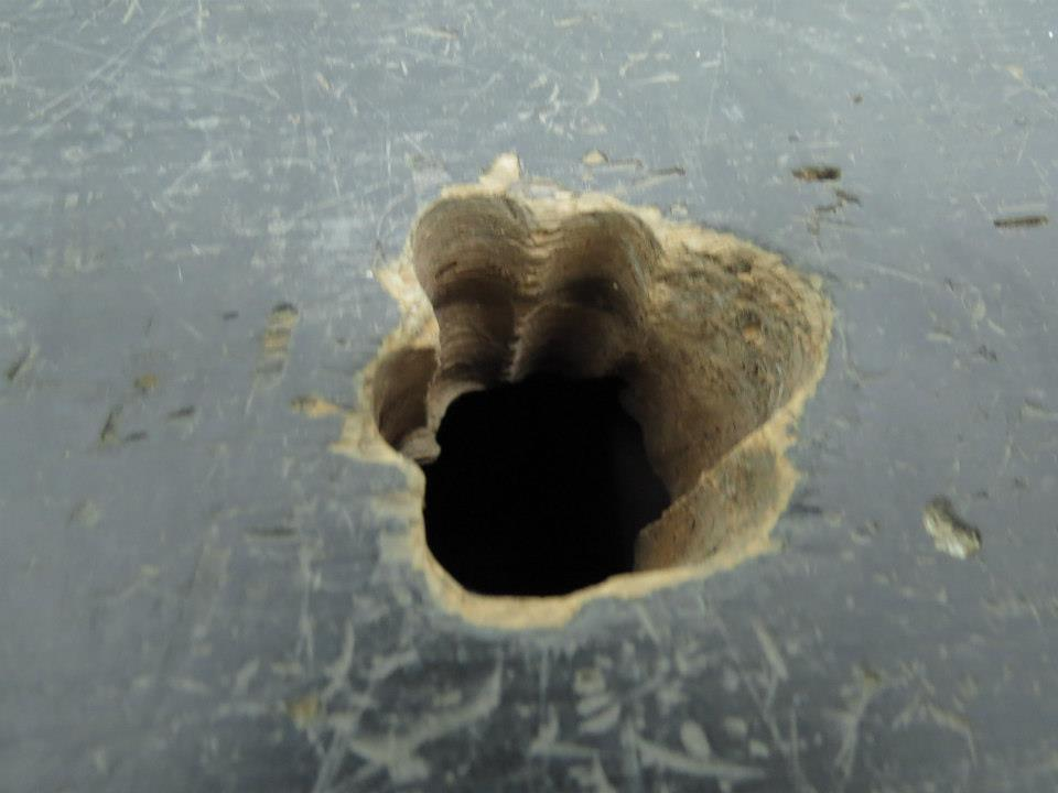 中文（台灣）: 國立臺灣大學植物標本館（桌子彈孔）